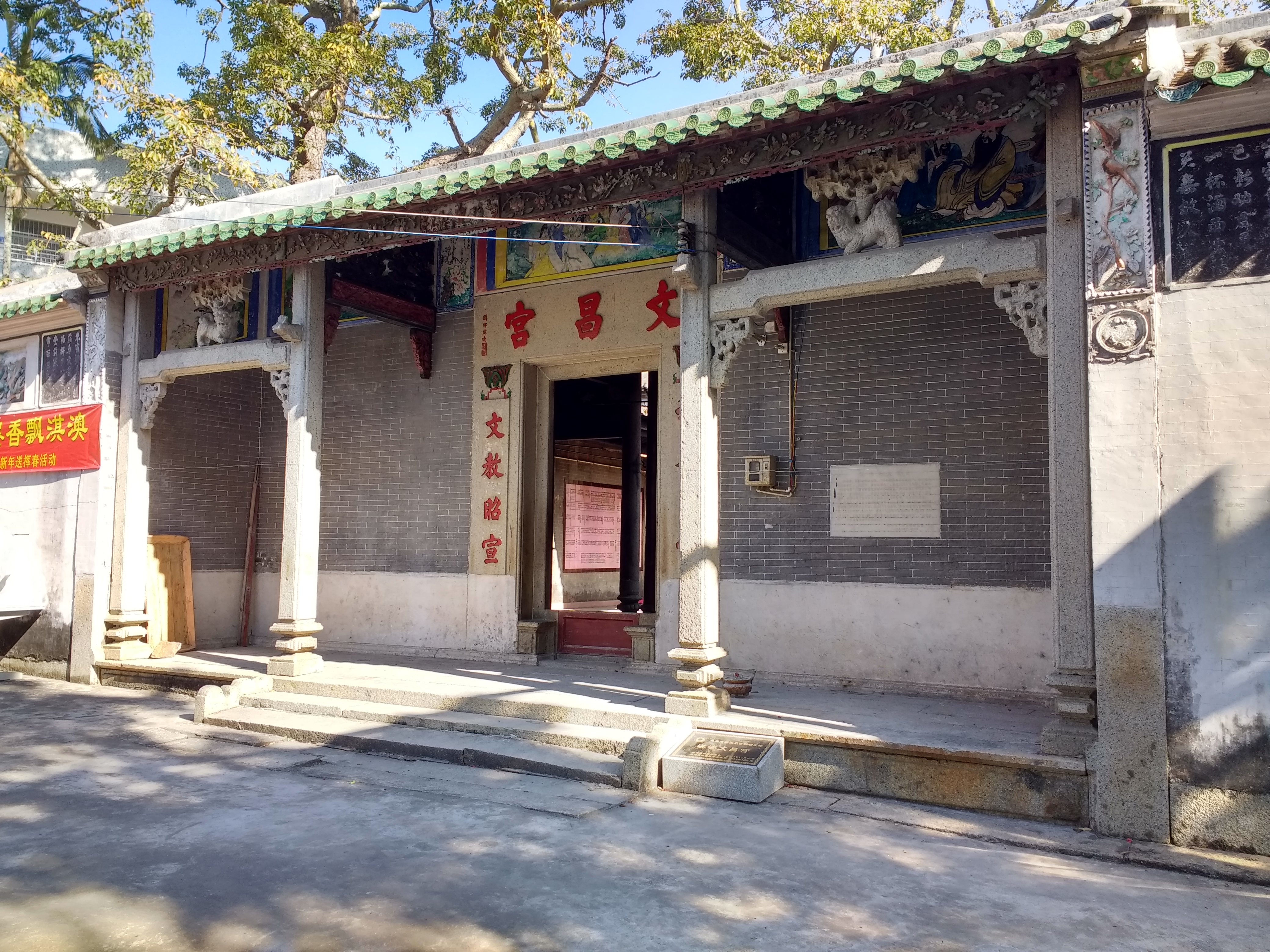 文昌宫，在珠海淇澳岛